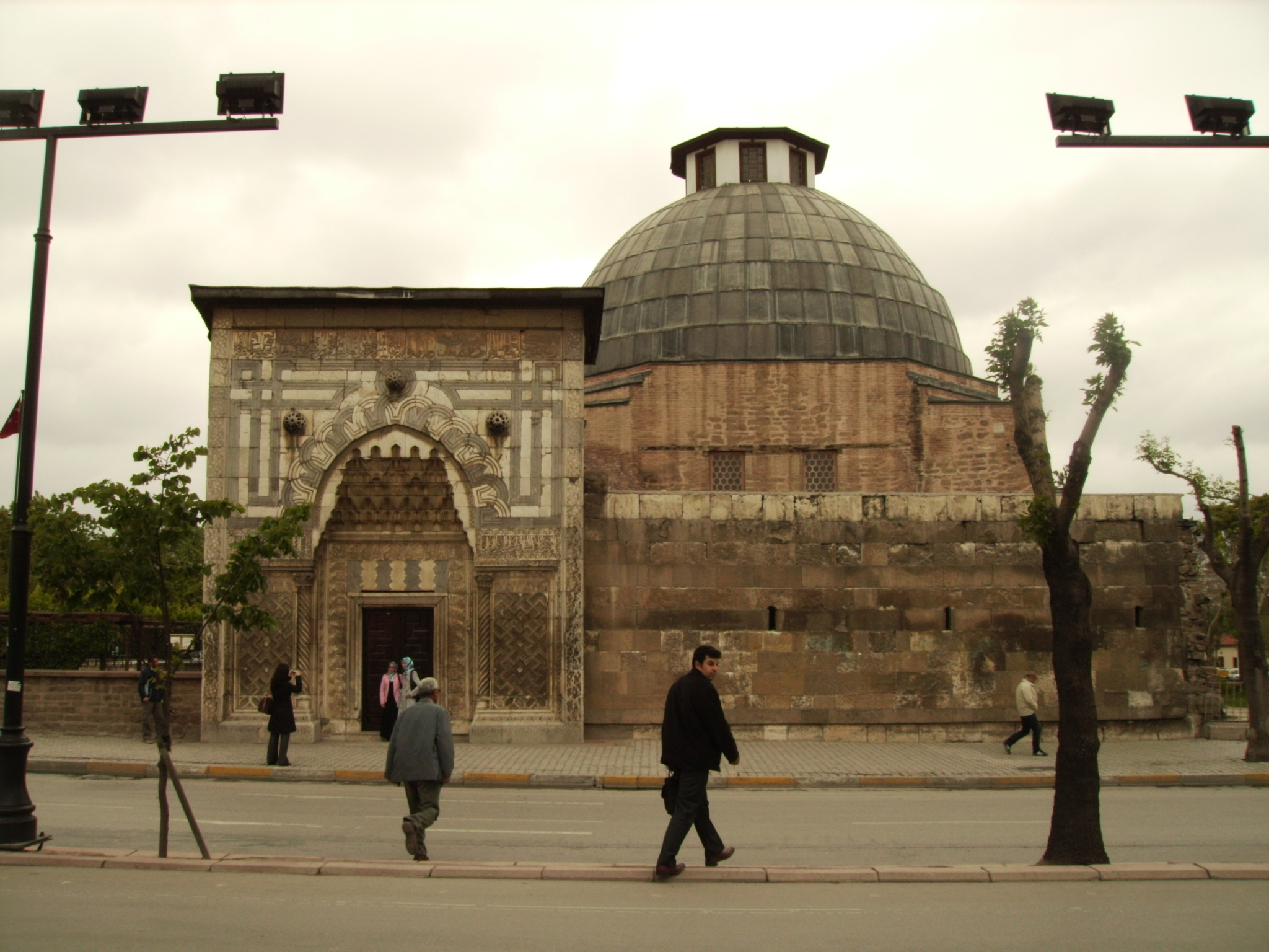 konya